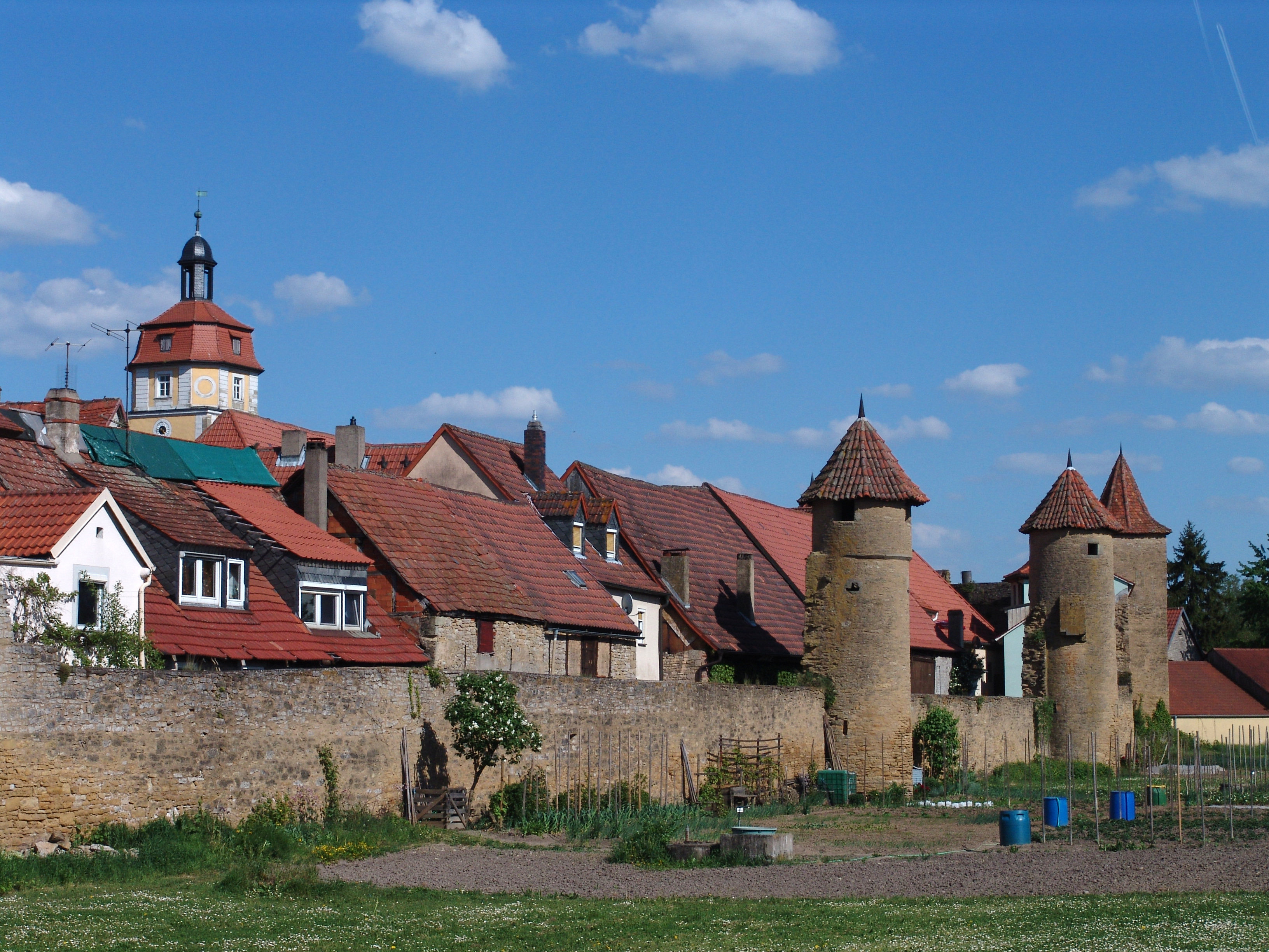 Mainbernheim-Südliche Stadtmauer